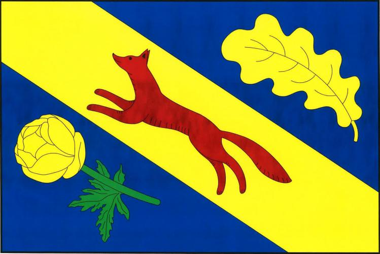 Skomelno vlajka